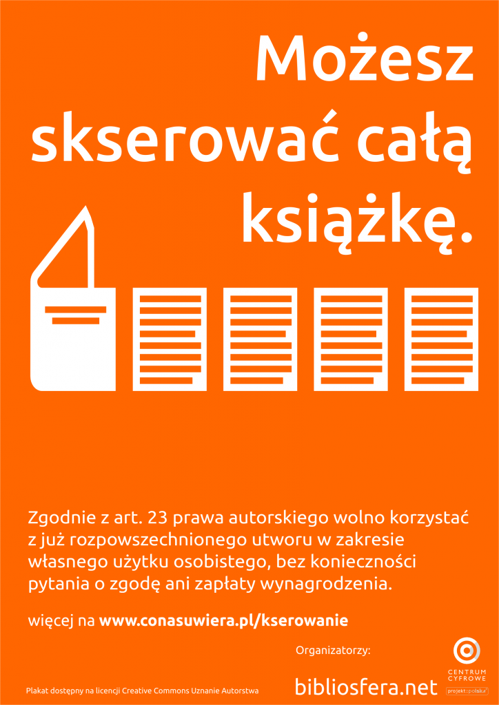 Plakat promocyjny akcji promującej wiedzę o dozwolonym użytku w bibliotekach